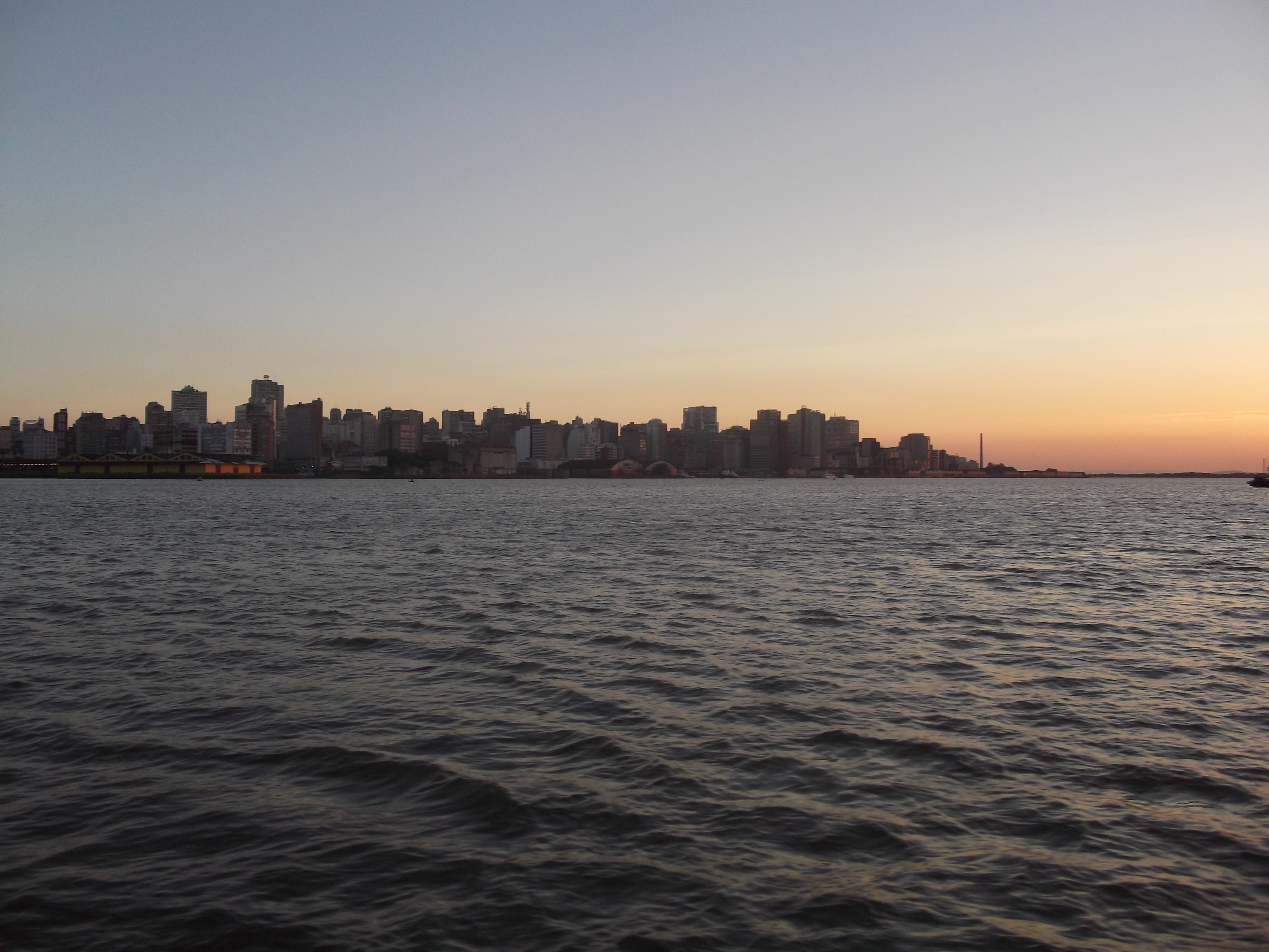 Panorâmica do Centro Histórico de Porto Alegre